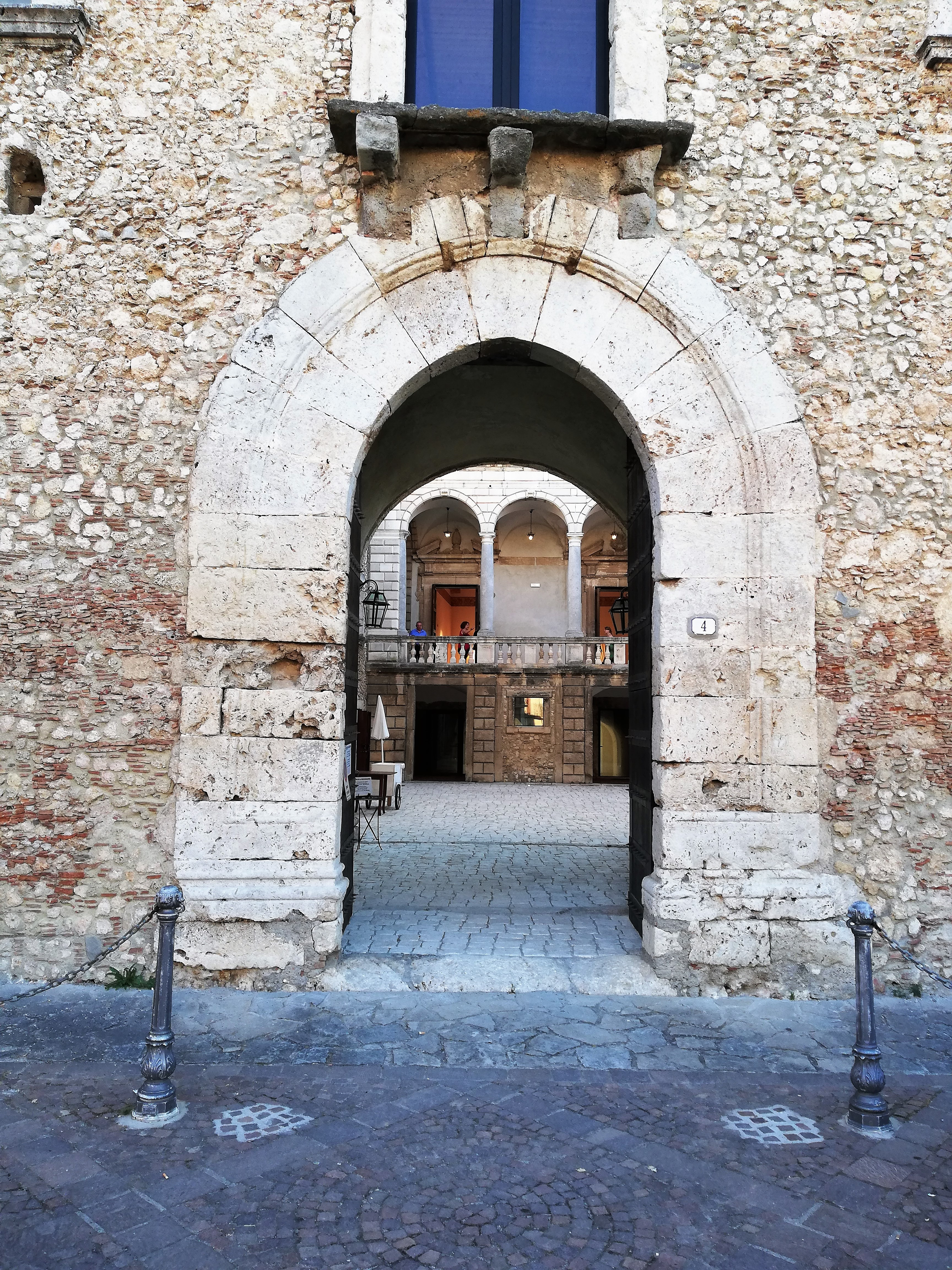 Portale d'accesso al Palazzo.